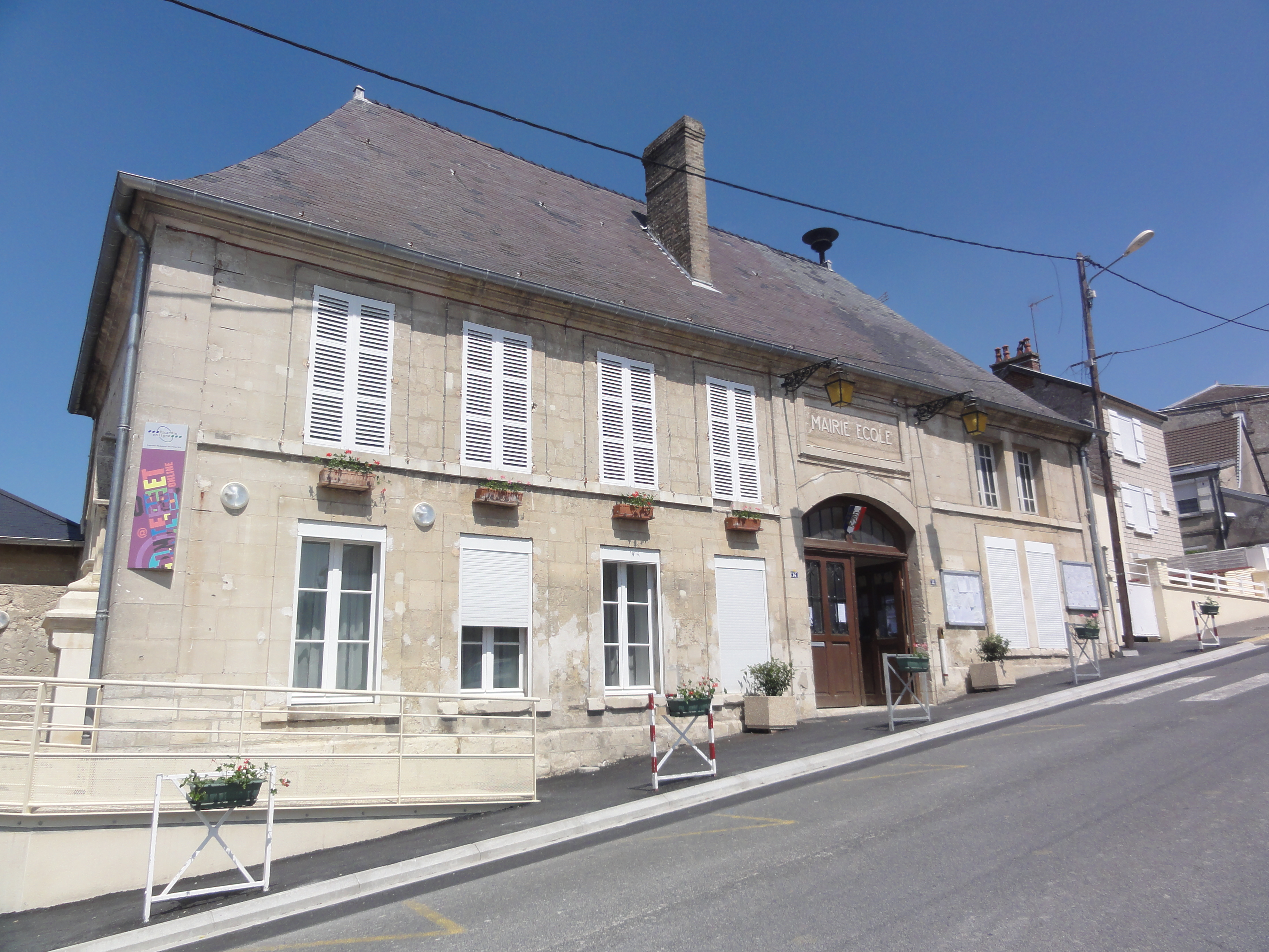 Beaurieux (Aisne) Mairie